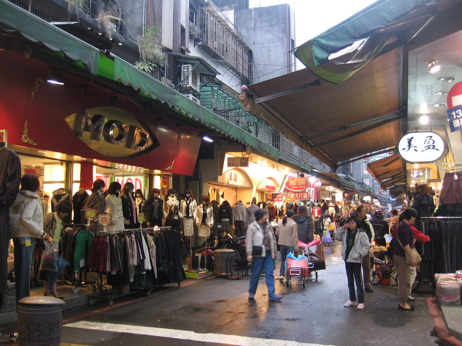 Wufenpu, Taipei, Taiwan